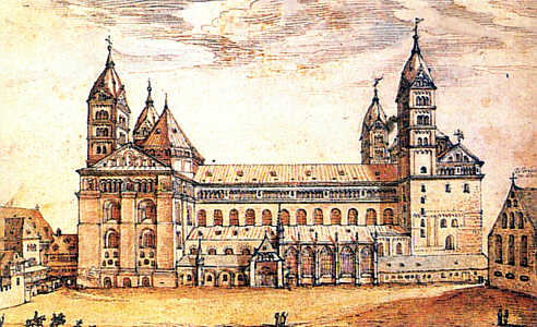 "Wiener Zeichnung" Die Ansicht von 1610 zeigt die Nordseite des Speyerer Dom mit den gotischen Kapellen sowie dem "Kleinen Paradies", dem Zugang von der Nordseite.